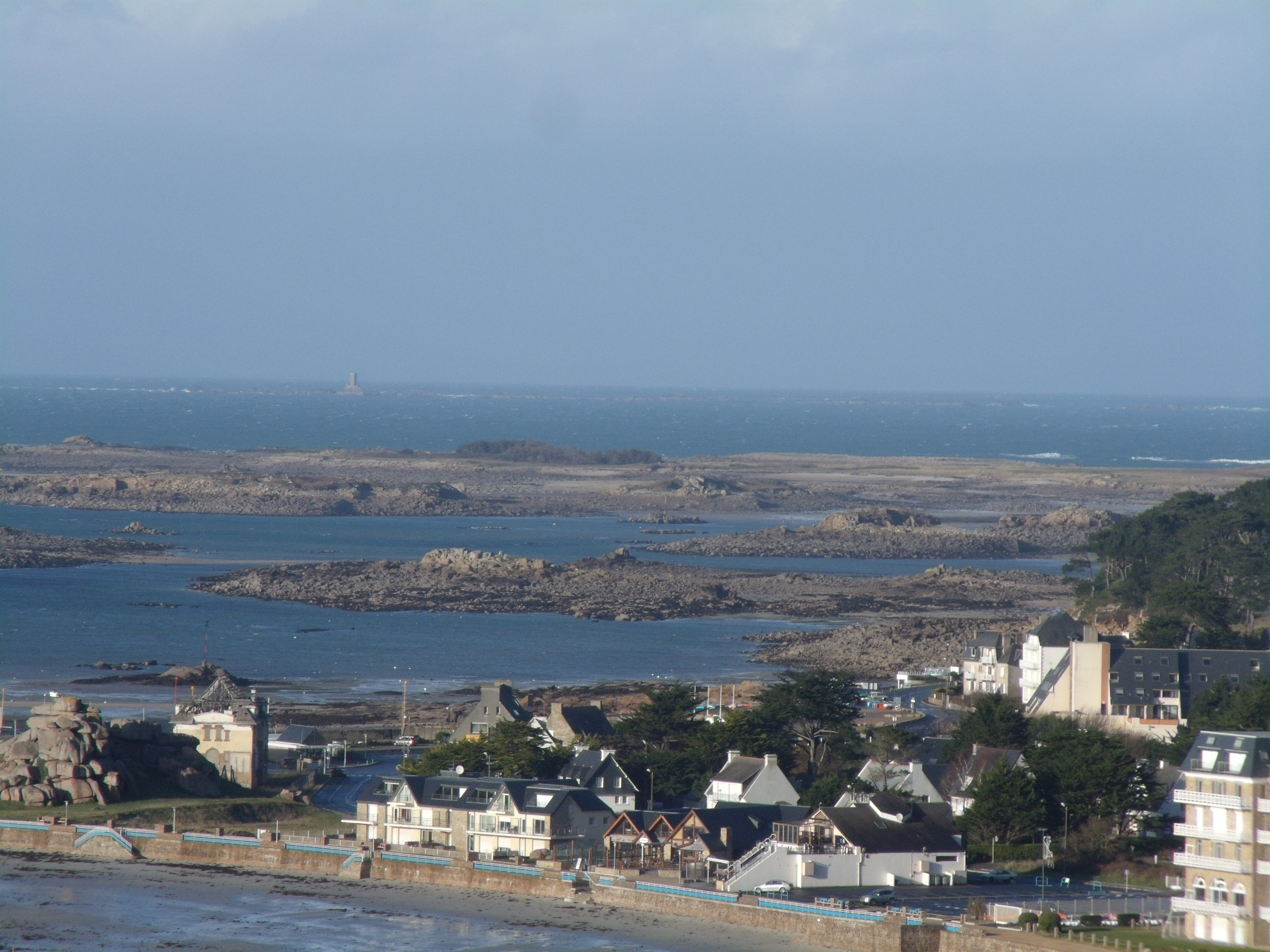 Trébeurden (plage de Tresmeur) et, en arrière plan, l'archipel des Triagoz; photo prise de la pointe de Bihit.